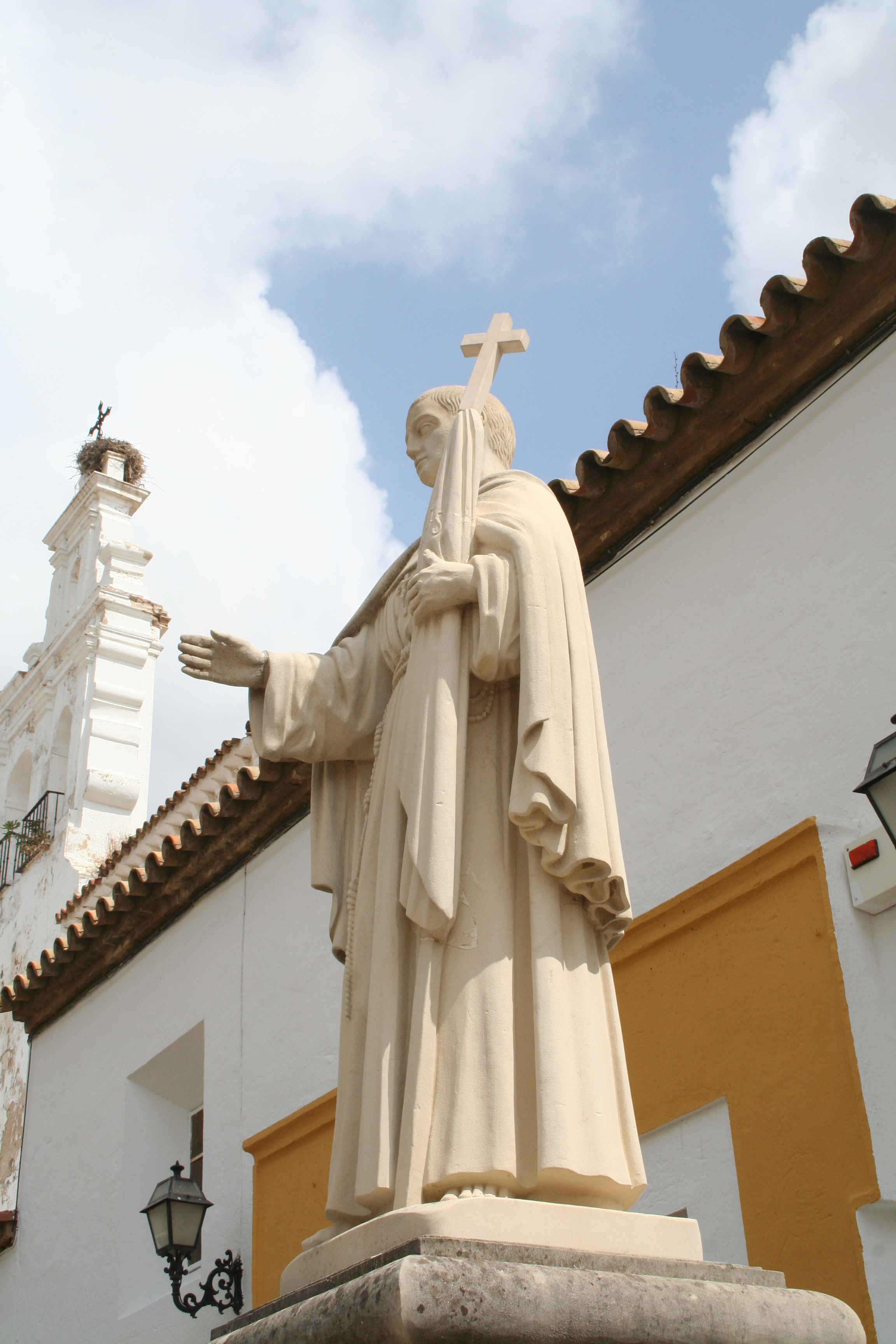 Beato Vicente Ramirez en Ayamonte